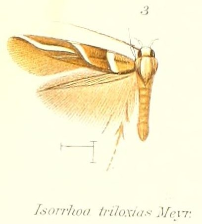 Isorrhoa triloxias